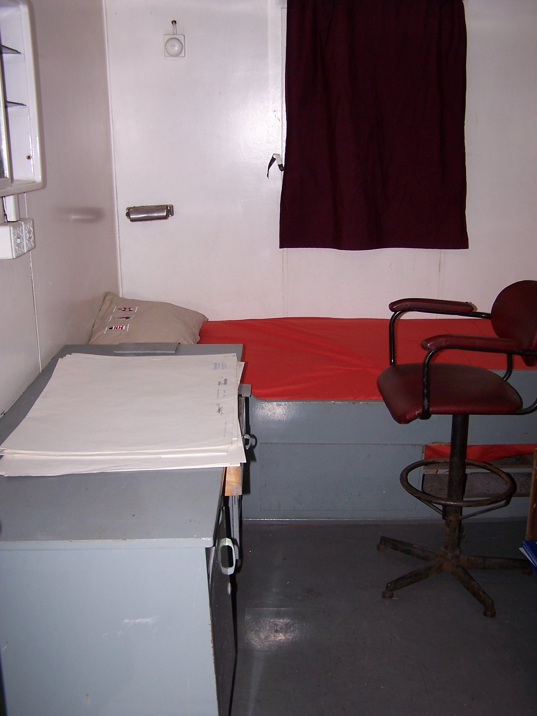 Photographie de la chambre réservée au pilote sur le Tamer Kiran. Le Tamer Kiran est un navire cargo polyvalent sorti des chantiers navals turcs Gemak en 1983. Il est la propriété du groupe Kiran, basé à İstanbul, et navigue sous pavillon turc.